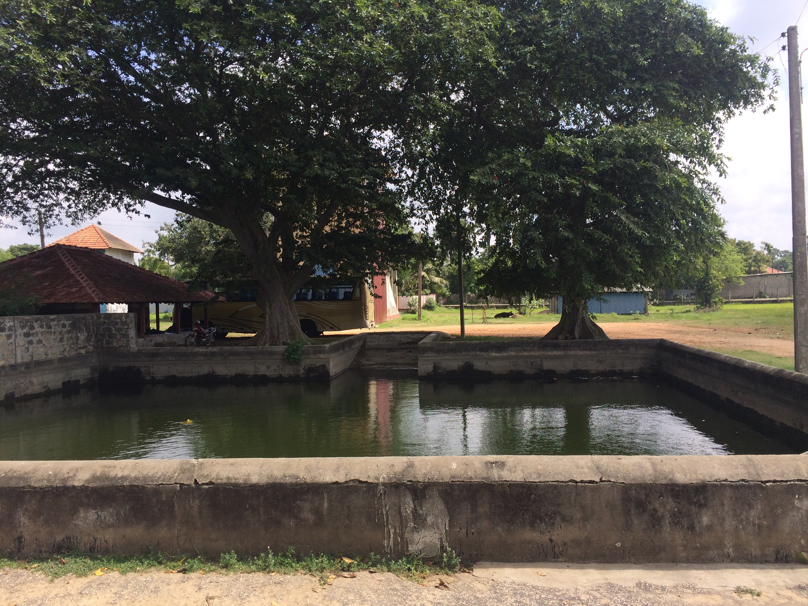 பத்திரகாளி சமேத வீரபத்திரர் கோயில்